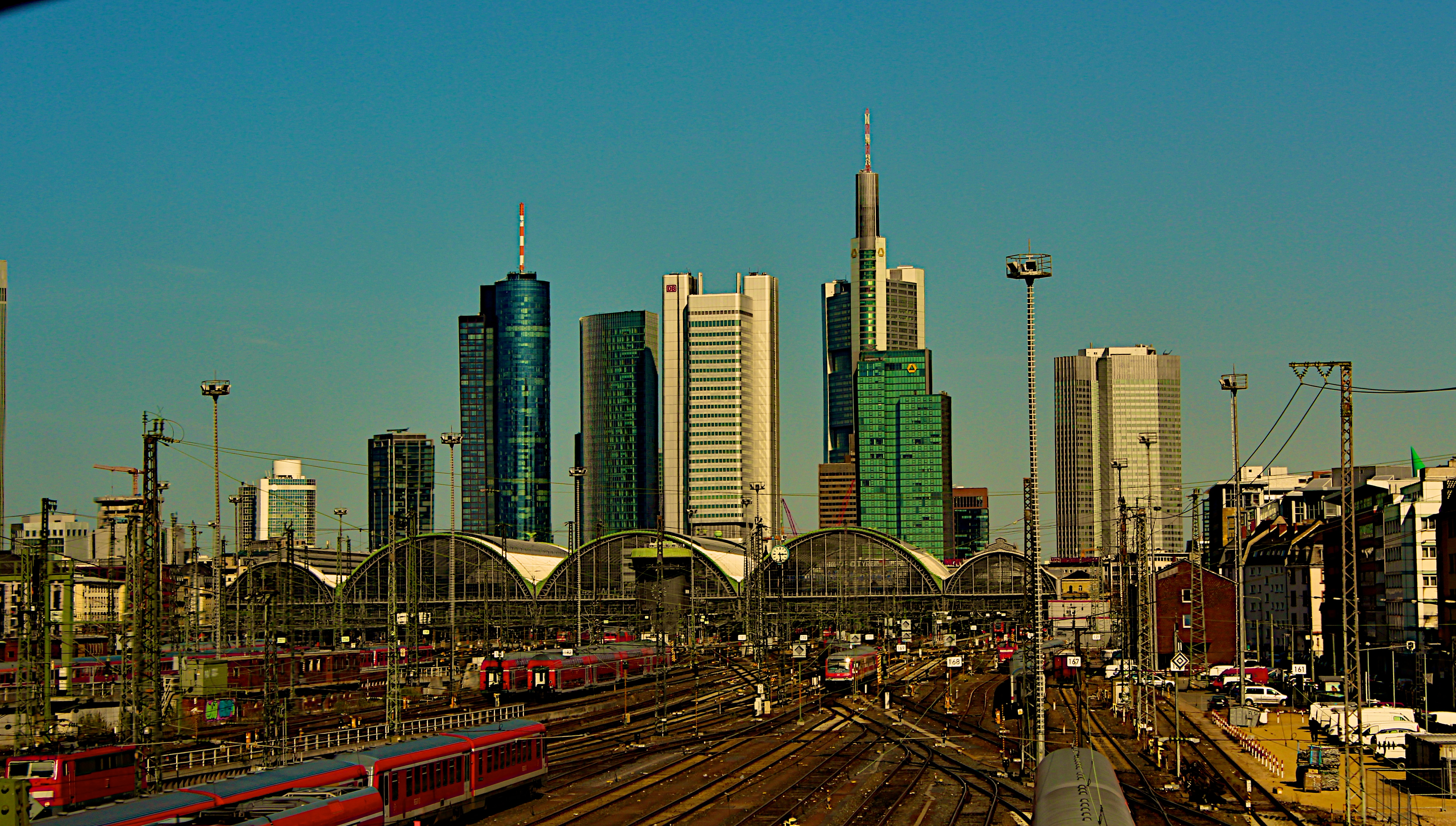 Frankfurter Skyline aus dem Zug.